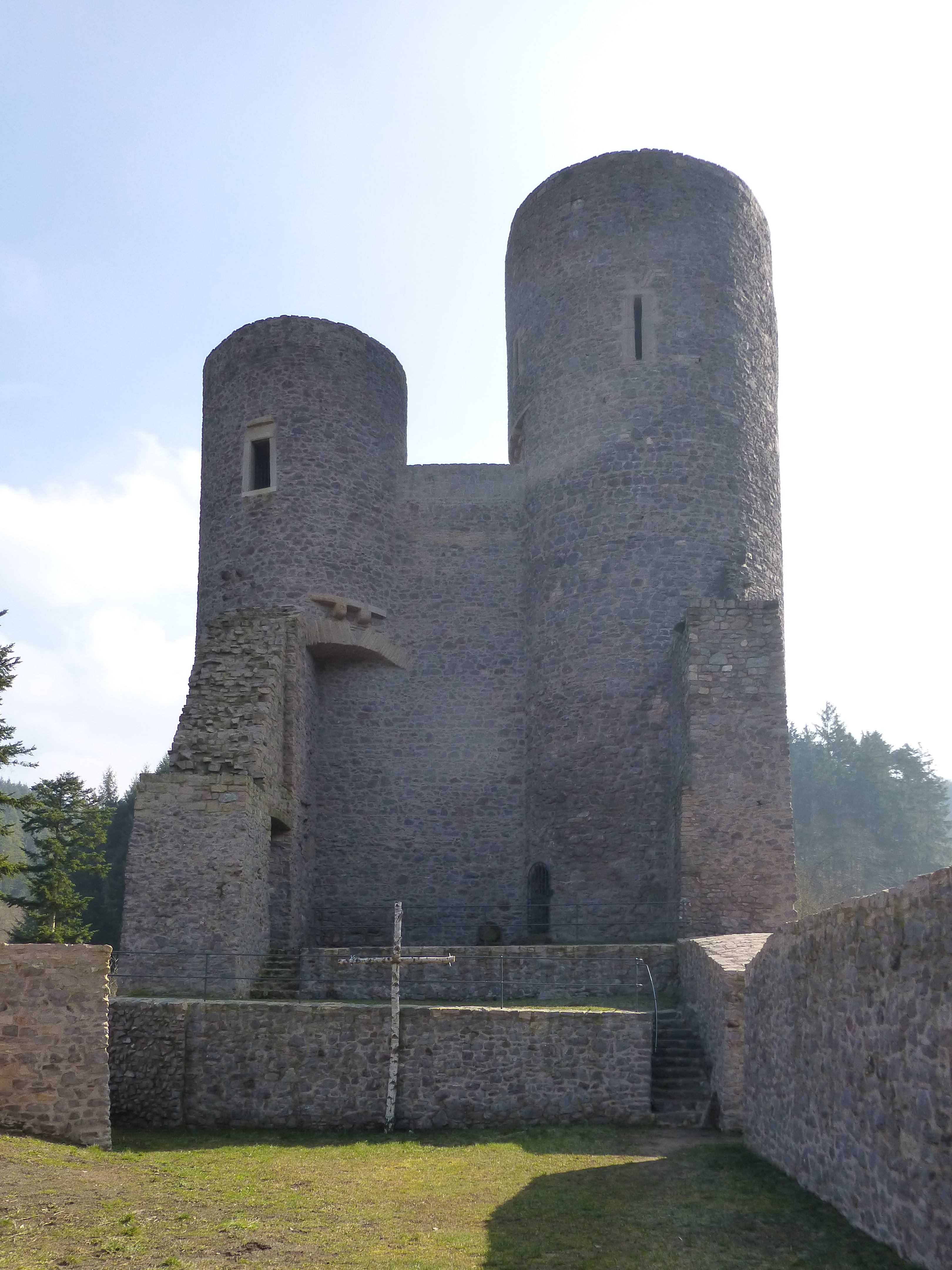 Burg Frauenberg, Rundtürme an der Ostseite; rechter Turm mit Aussichtsplattform